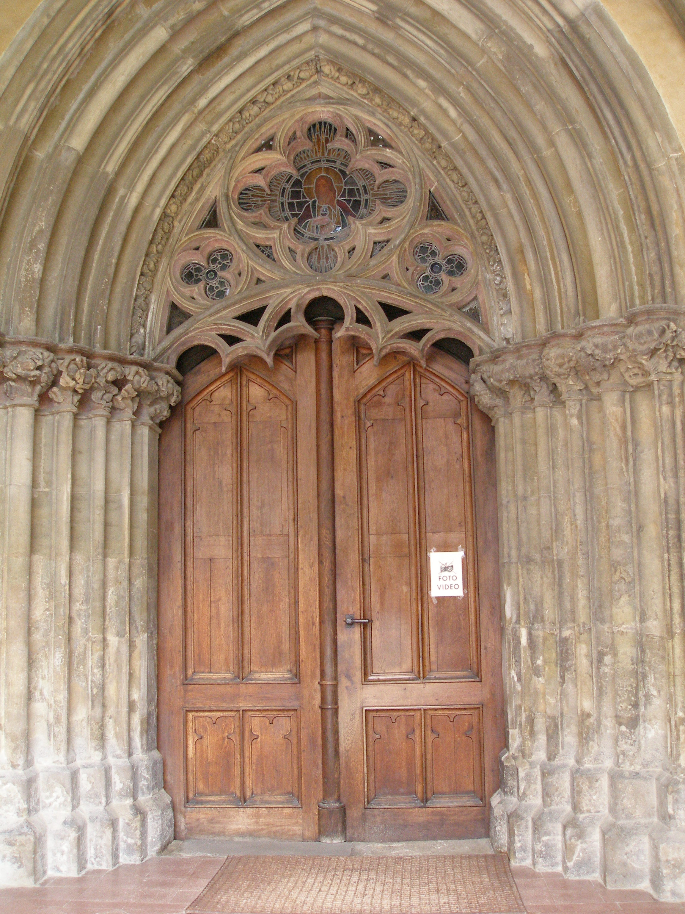 Chrám svätého Jakuba v meste Levoča. Okres Levoča.región Spiš.